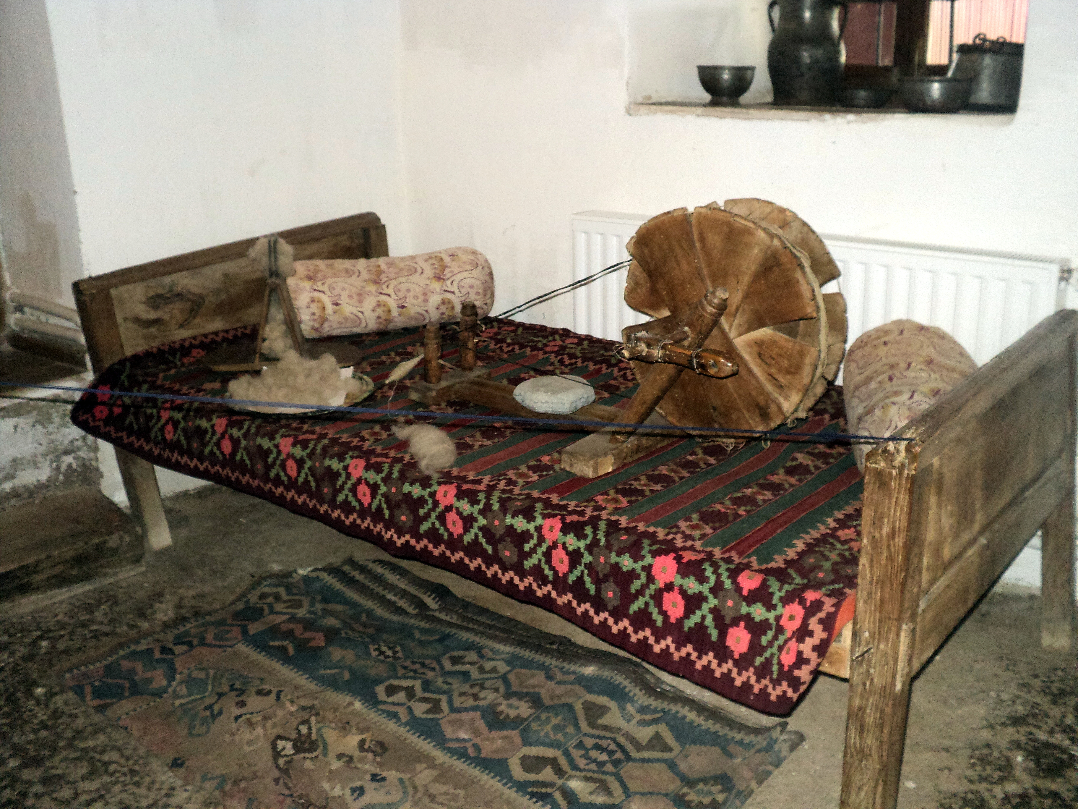 Հովհաննես Թումանյանի տուն-թանգարան, Դսեղ